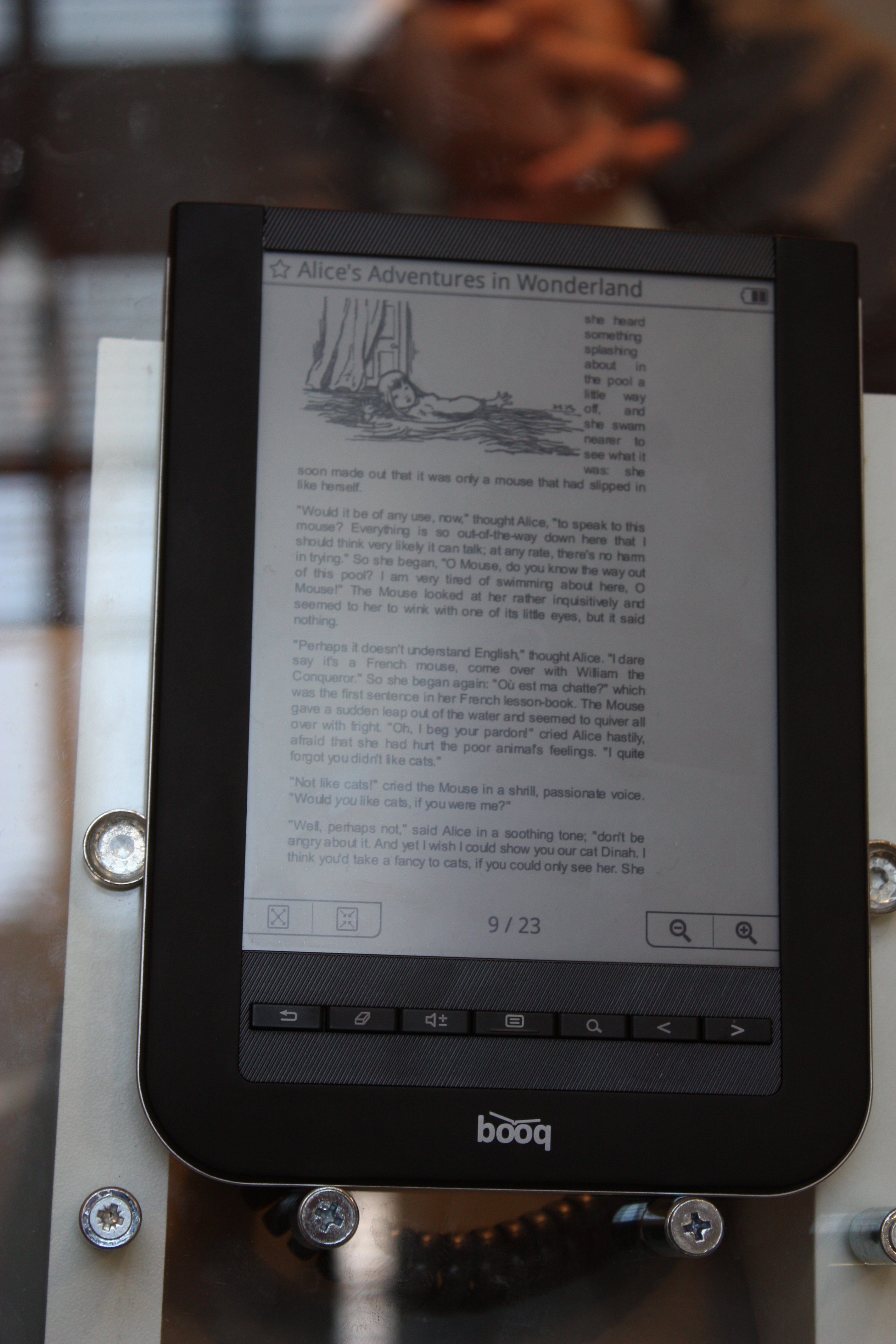 IFA 2010, Berlin; booq e-book reader